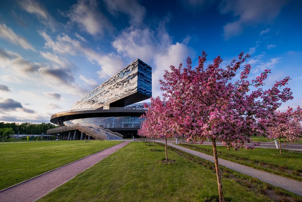 Фото здания кампуса Московской школы управления «Сколково» в Московской обл., Одинцовском р-не, на 1-ом километре Сколковского шоссе